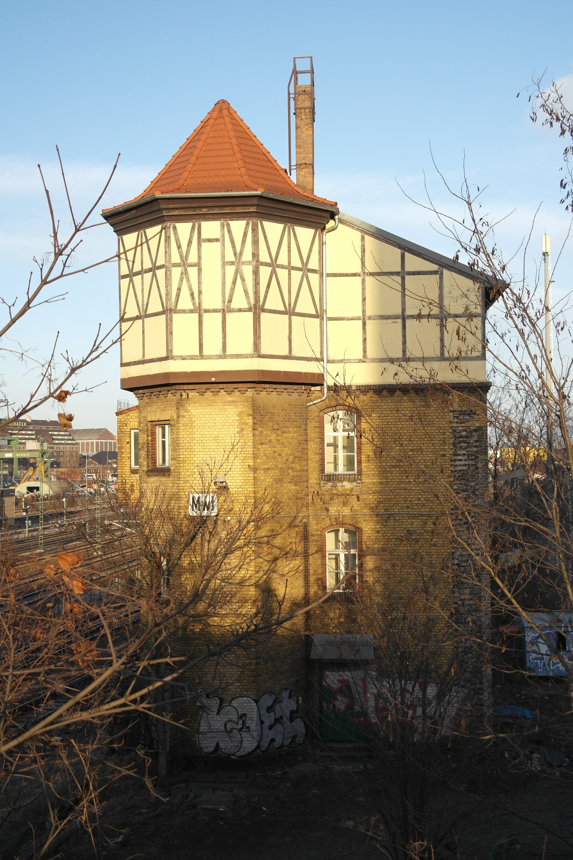 Bahnhof Berlin-Moabit, denkmalgeschütztes Stellwerk Mwt von Karl Cornelius